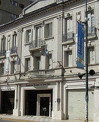 Edificio del Rectorado de la Universidad Nacional de Entre Ríos en Concepción del Uruguay. La imagen fue redimensionada de la original alojada en bajo la licencia mencionada abajo.